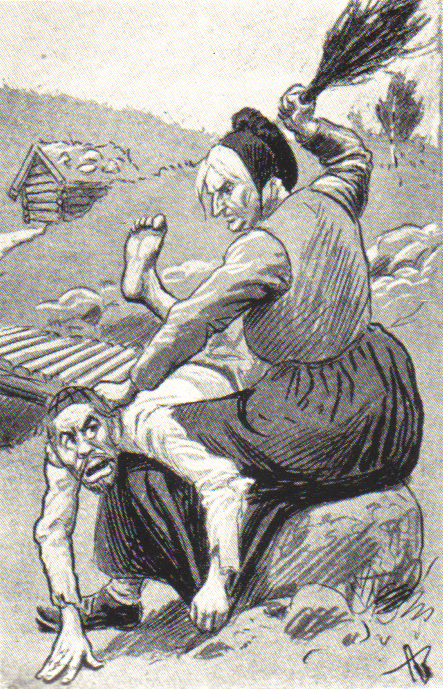 Karikatur av Andreas Bloch fra "Korsaren" 1905. Johan Scharffenberg får ris av mor Åse.